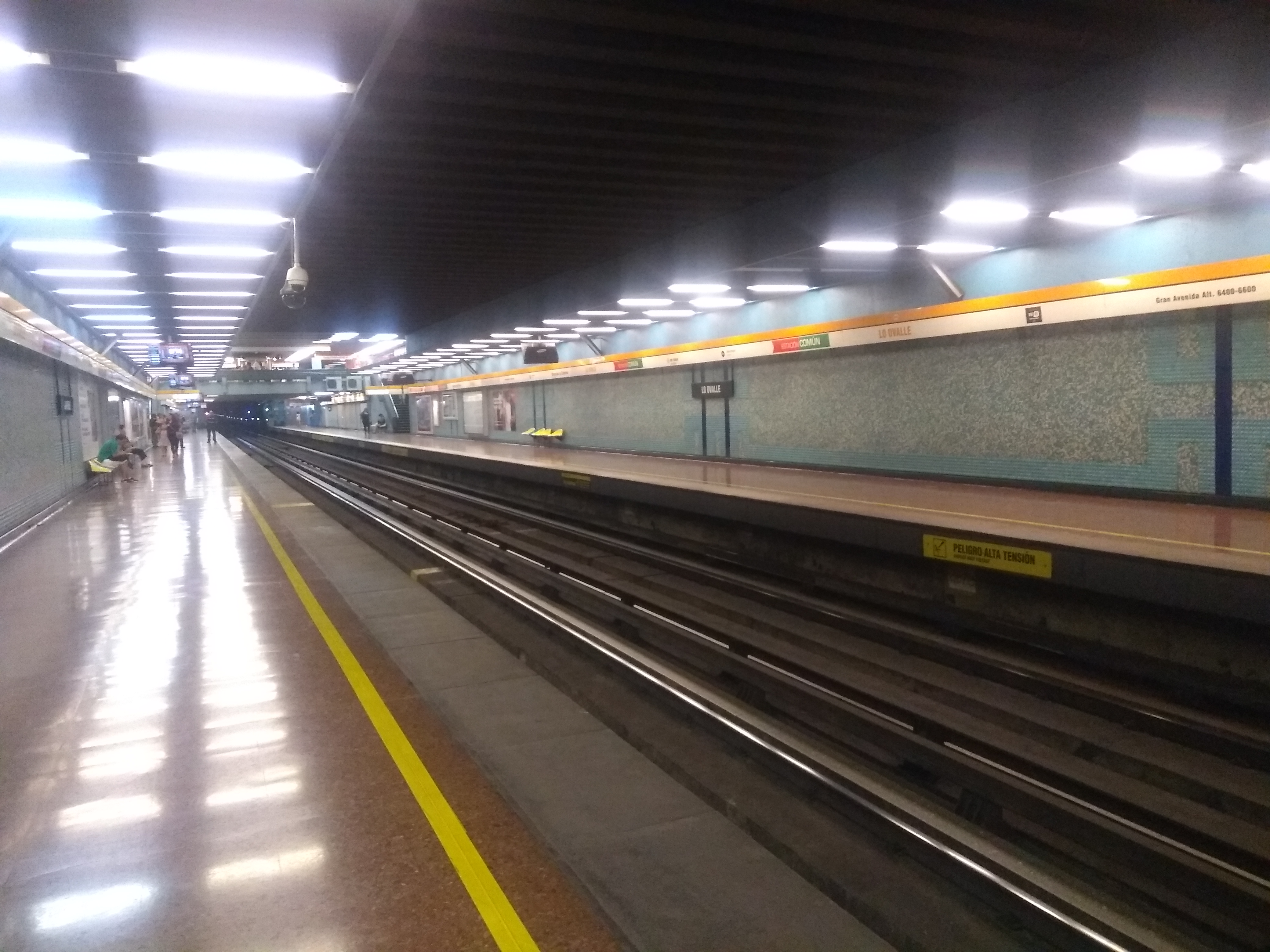 Estación Lo Ovalle de la L2, ubicada en la comuna de La Cisterna.